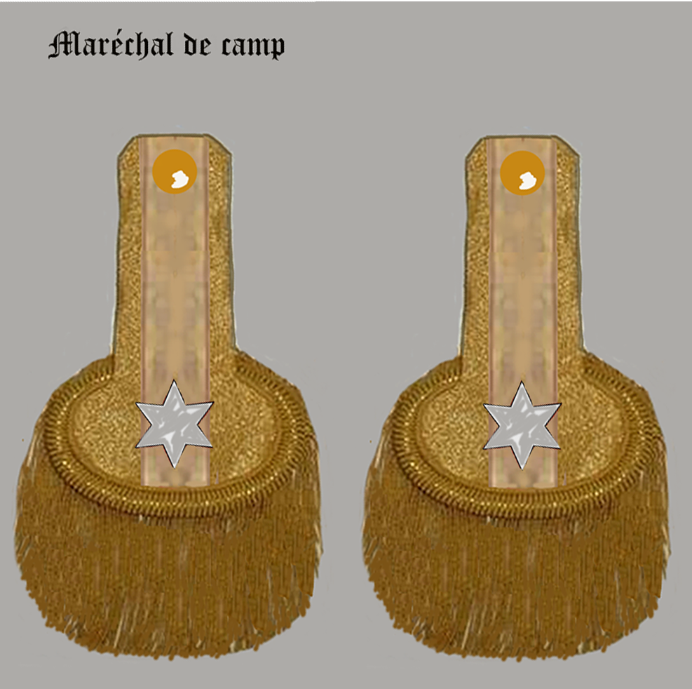 Marechal de camp de cavalerie royal française“